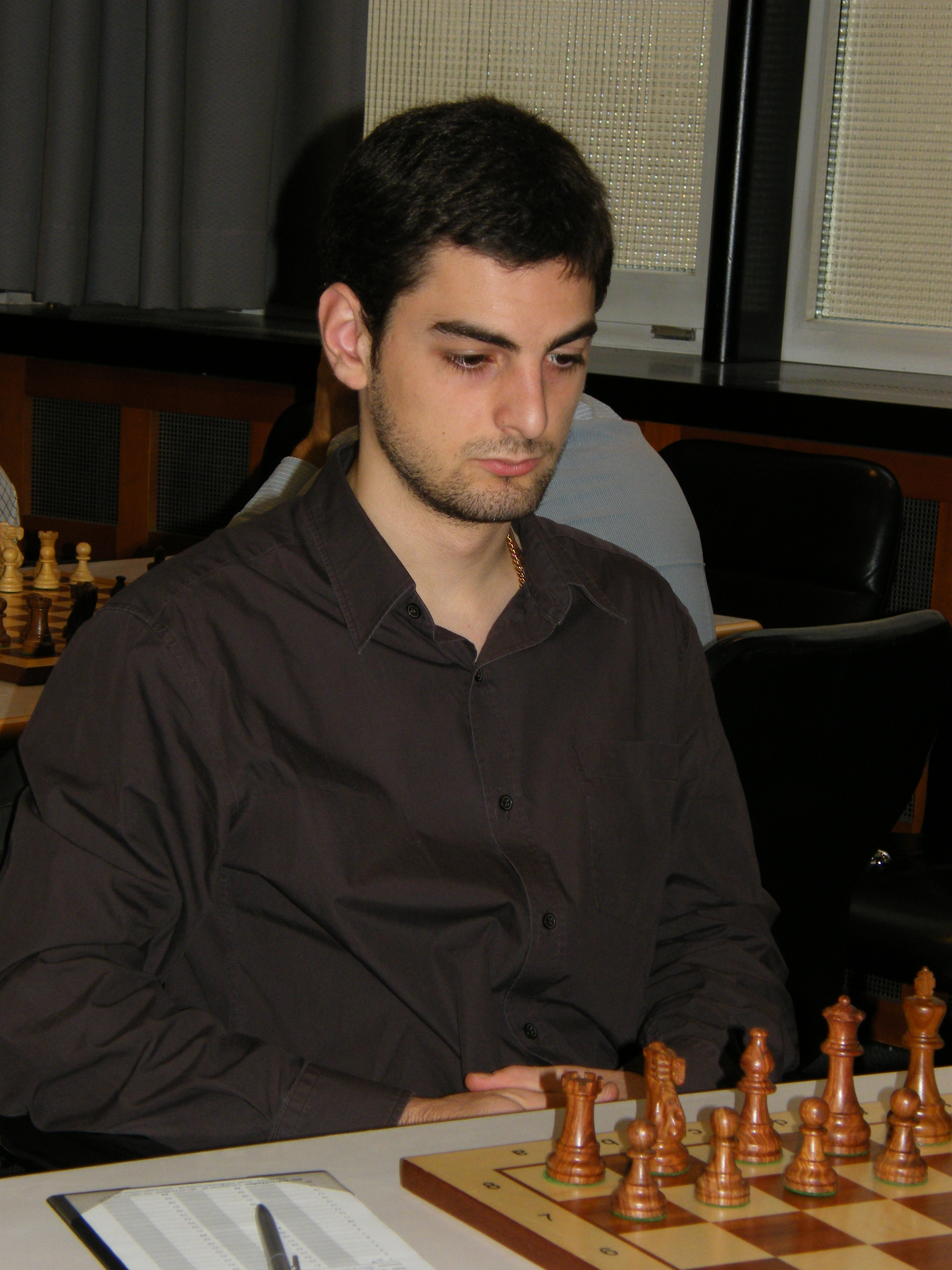 David Baramidze bei der 3. Runde der Schach-Bundesliga 2008/09 im Rathaus Schöneberg in Berlin